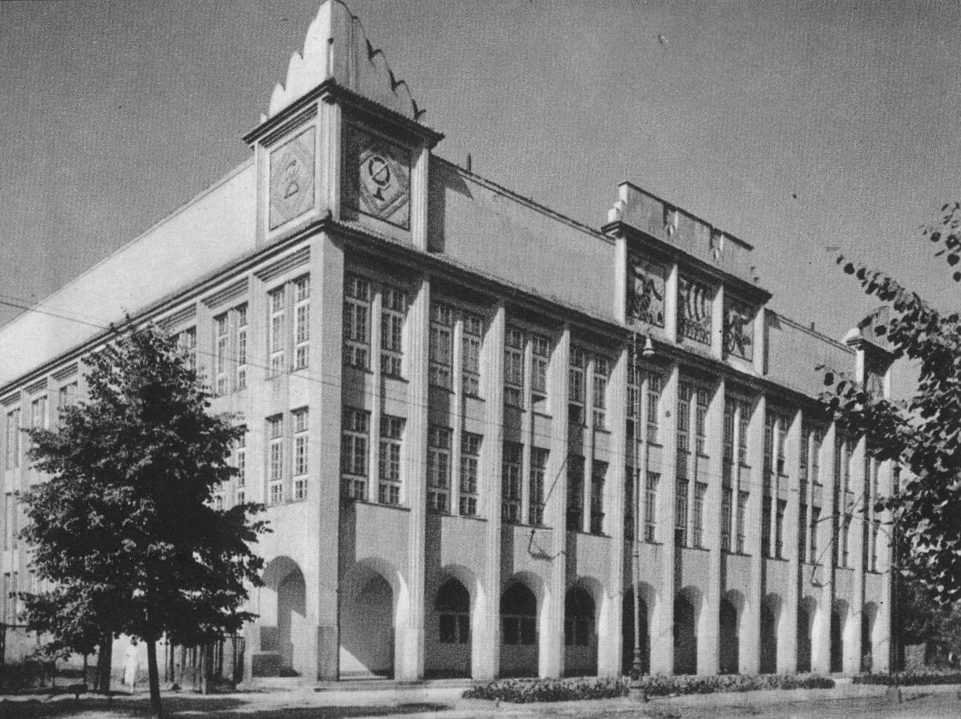 Budynek "A" Szkoły Głównej Handlowej przy ul. Rakowieckiej 24 w Warszawie